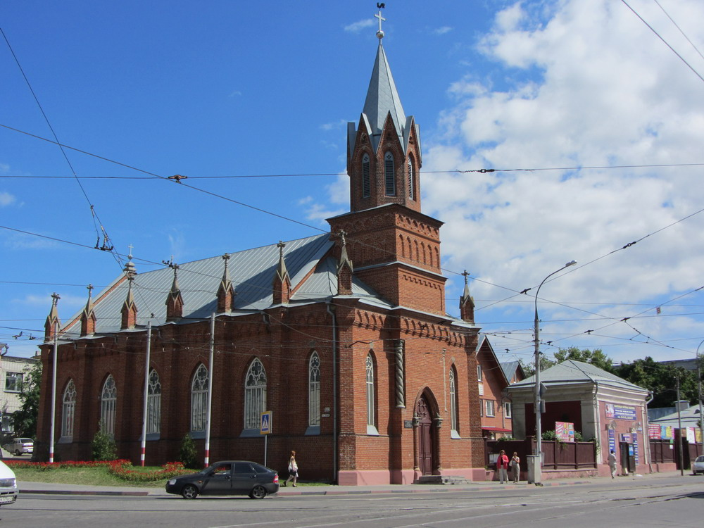 Протестантская кирха